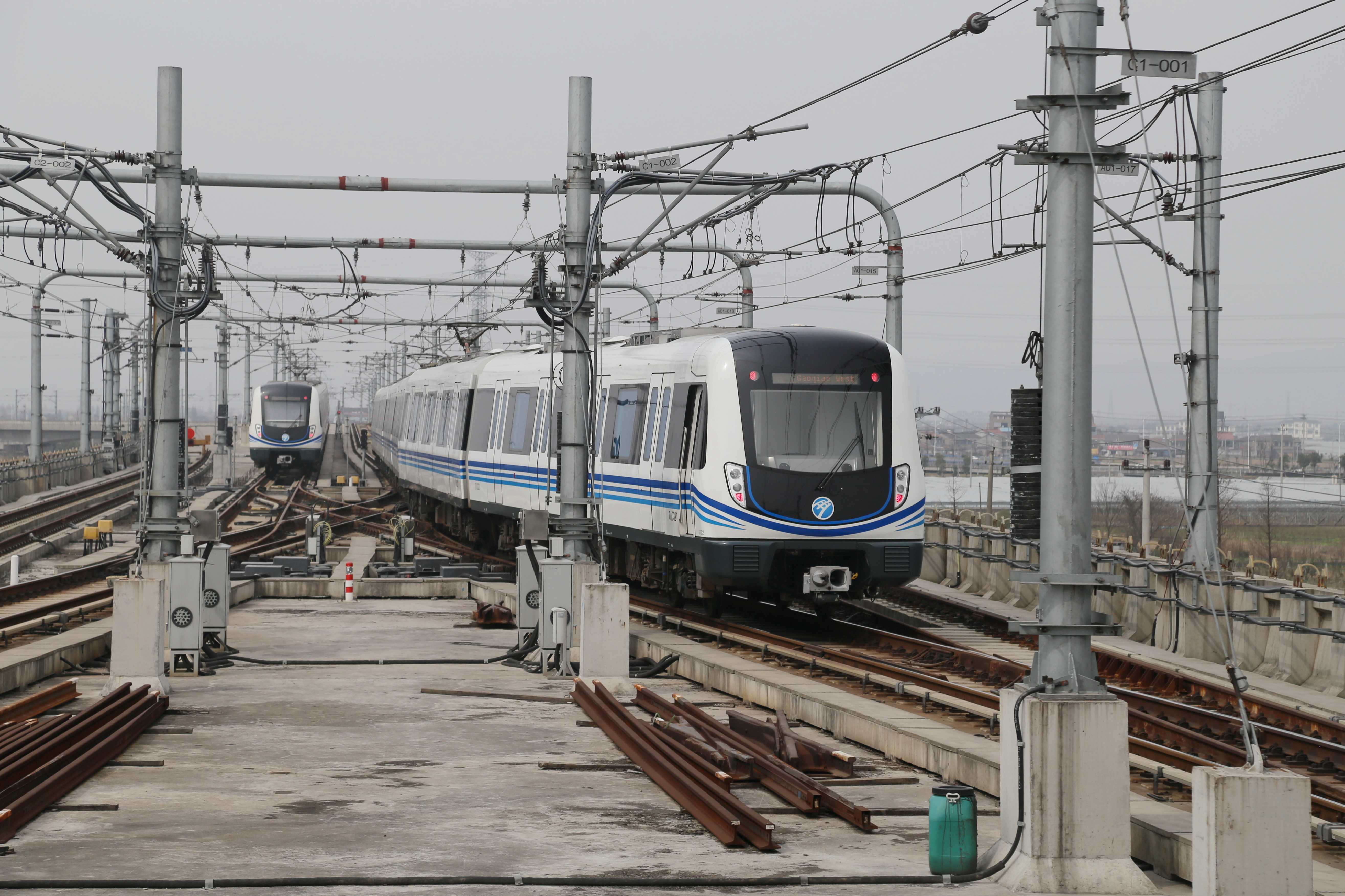 1号线列车在高桥西站折返